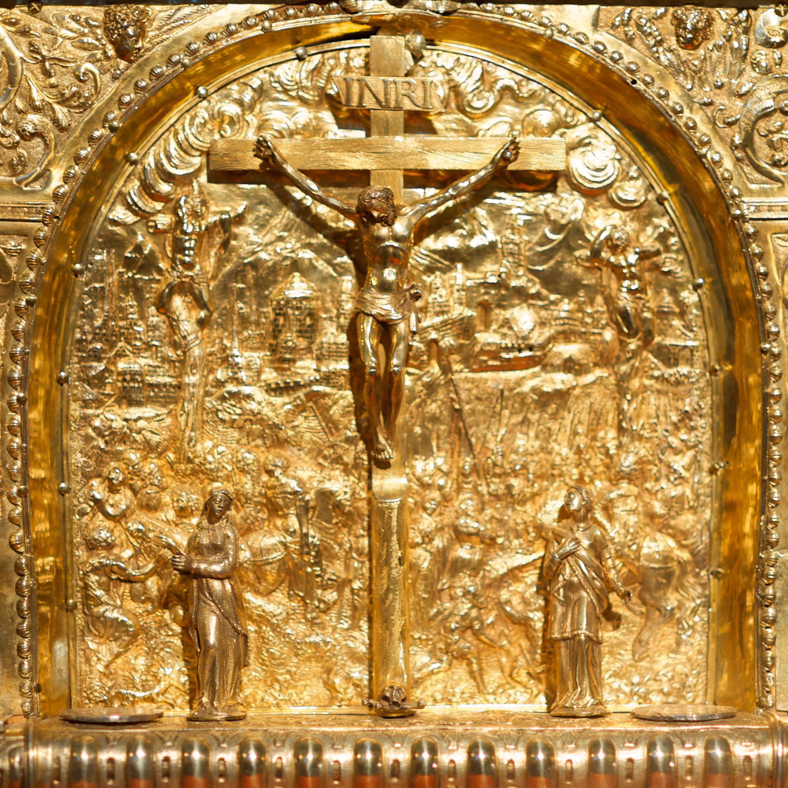 Darstellung des Kalvarienberges auf dem Paderborner Liborischrein